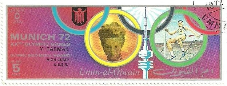 Jüri Tarmak